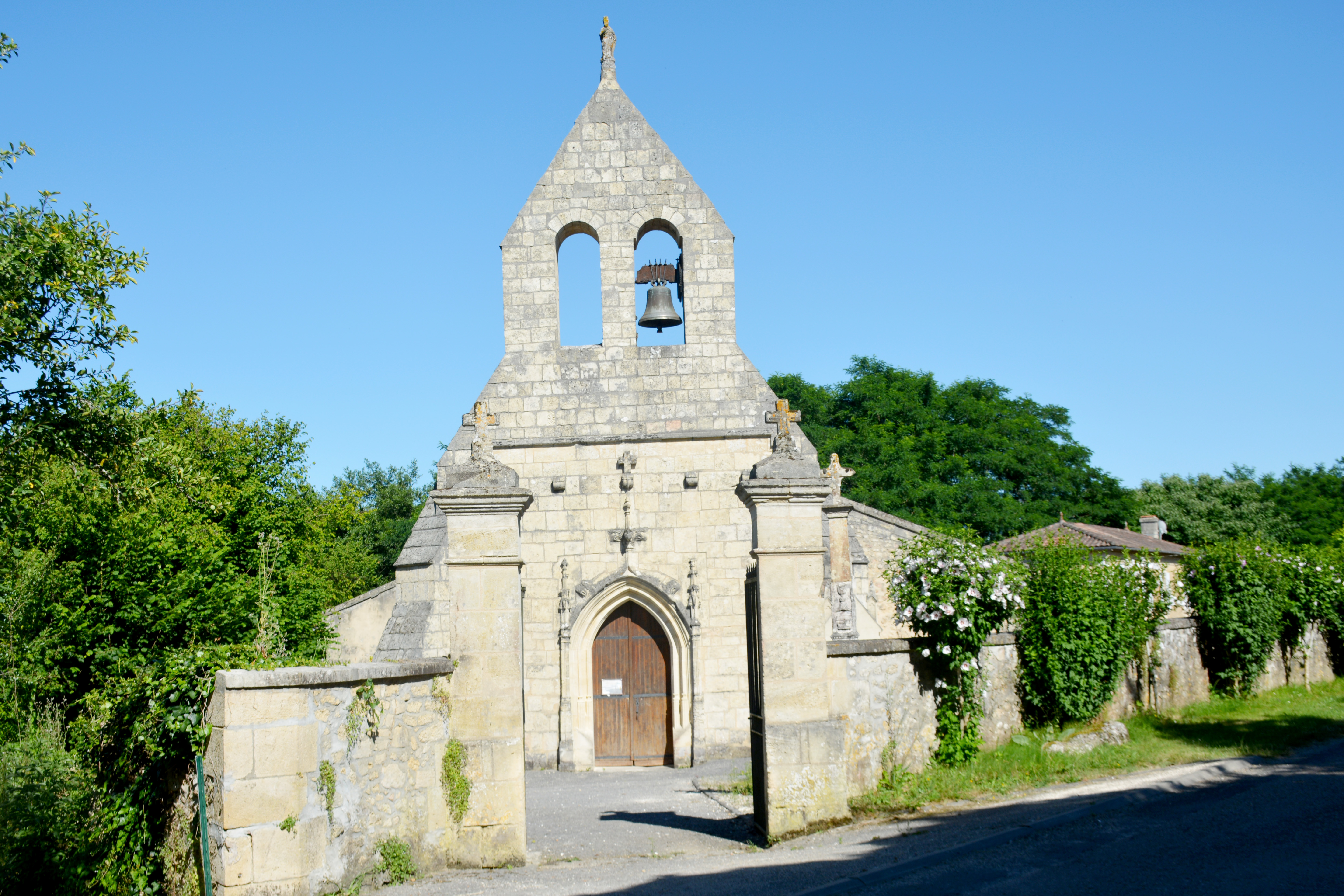 Église Saint Seurin d'Escoussans